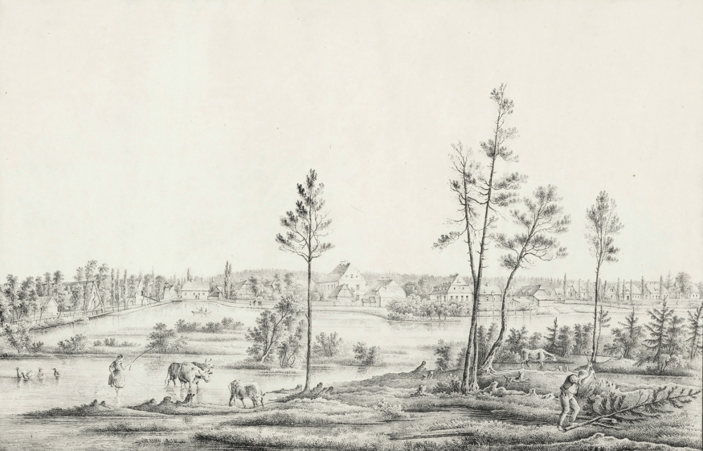 Ansicht von Sausenberg in Oberschlesien im 19. Jahrhundert.